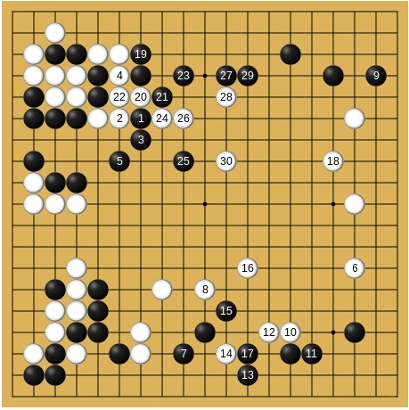 2018年1月5日 第2回Mlily夢百合杯世界囲碁オープン戦決勝五番勝負第5局 李世乭-柯潔(先番) 53-82手